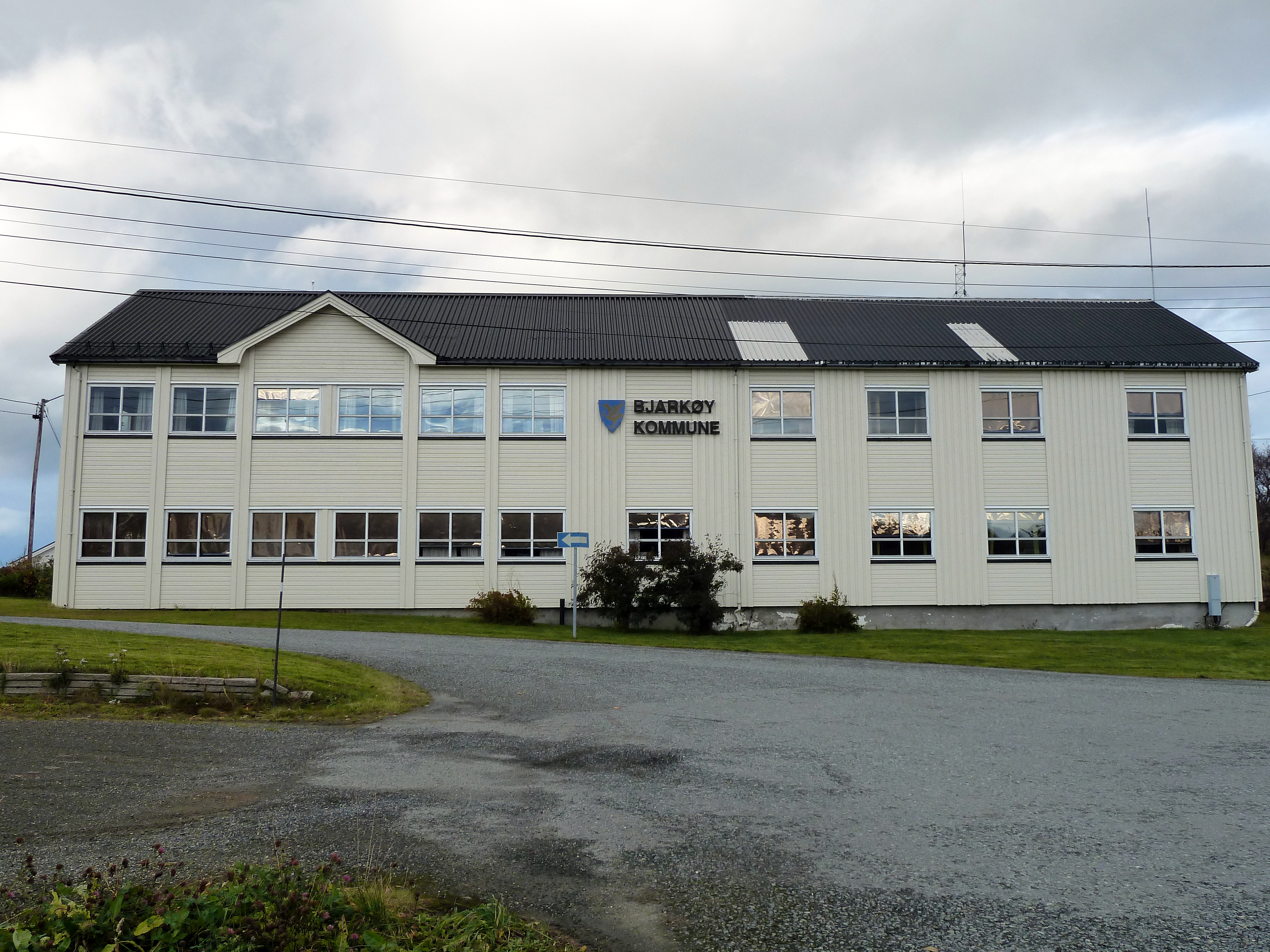 Kommunehuset i den tidligere Bjarkøy kommune i Troms ligger i Nergårdshamn på Bjarkøya.